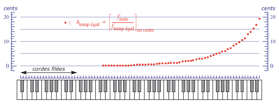 Inharmonicité du piano, mesure 2 (relevé d'accord)